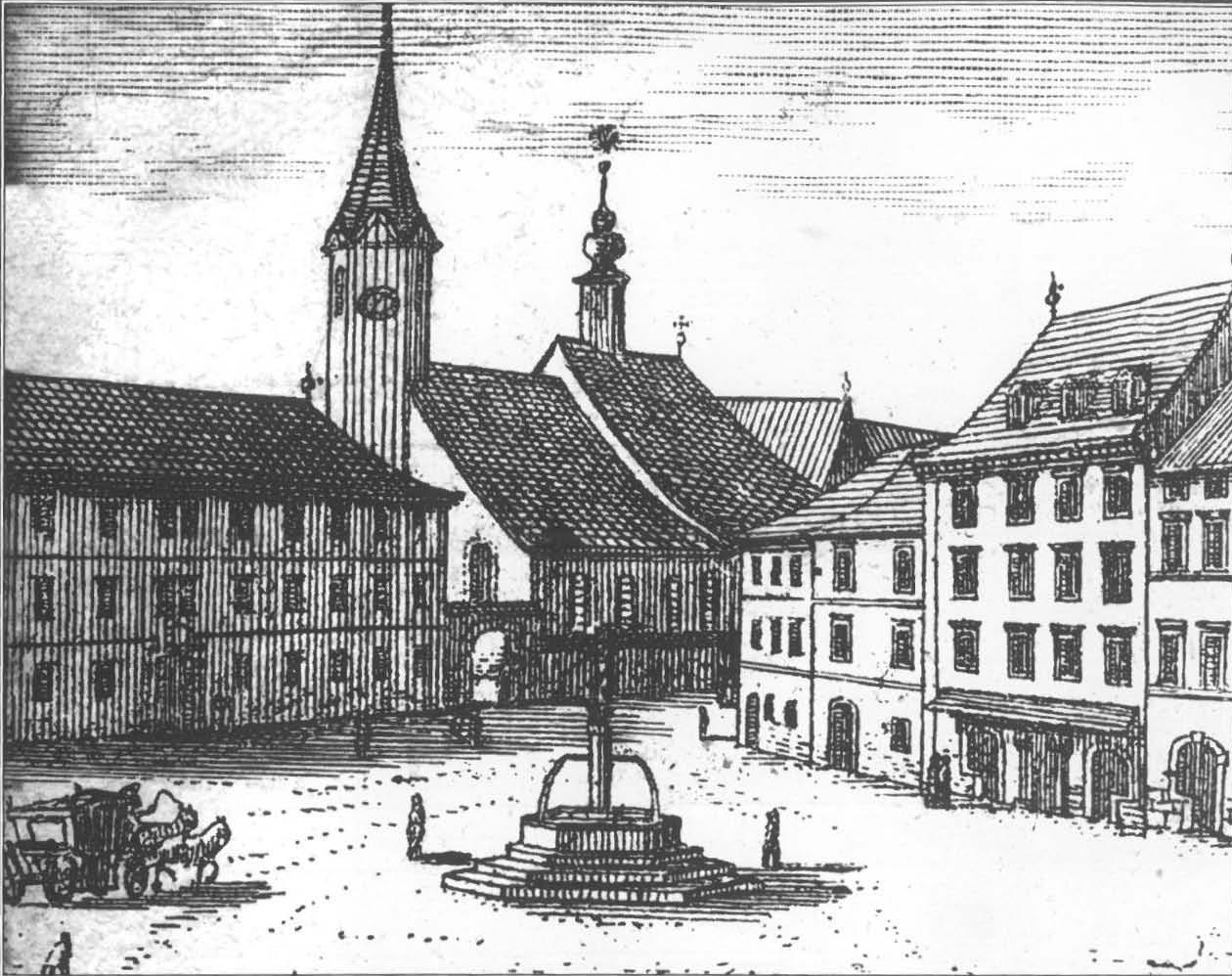 Valvasorjev bakrorez Mestnega trga s stolnico. Izsek iz Velike vedute Ljubljane (Slava Vojvodine Kranjske), objavljen leta 1899 kot razglednica (založil A. Turk).